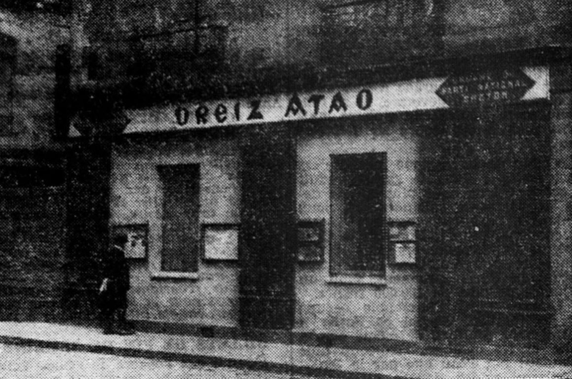 façade de la revue Breiz Atao à Rennes en 1938, rue des francs bourgeois.